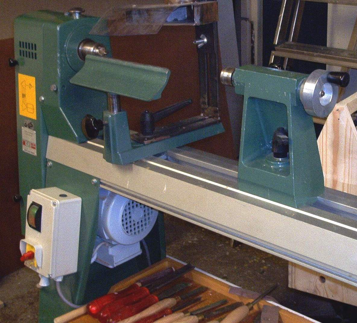 zelfgemaakte foto t.b.v. publiek domein. Martink.